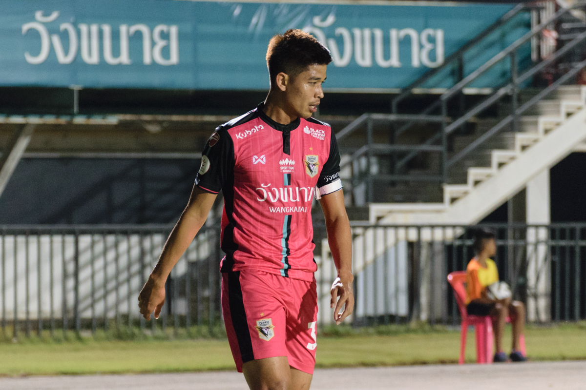 Anuwat Noicheunphan